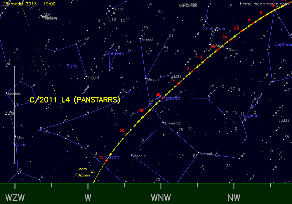 De baan van de komeet C/2011 L4 PANSTARRS aan de westelijke avondhemel voor een waarnemer in Utrecht. De sterrenachtergrond ten opzichte van de horizon klopt exact voor 25 maart om 19:00 uur, het moment waarvoor de hemelkaart is gemaakt. De positie van C/2011 L4 PANSTARRS ten opzichte van de sterren is voor ieder moment correct. De schemering is niet correct weergegeven — met name in maart zal het nog flink schemeren en zullen niet alle weergegeven sterren zichtbaar zijn. De gele symbooltjes en labels geven de positie om de vijf dagen weer — het getal geeft de dag van de maand: eerst in maart, later (verder naar rechtsboven) in april en mei. Bron